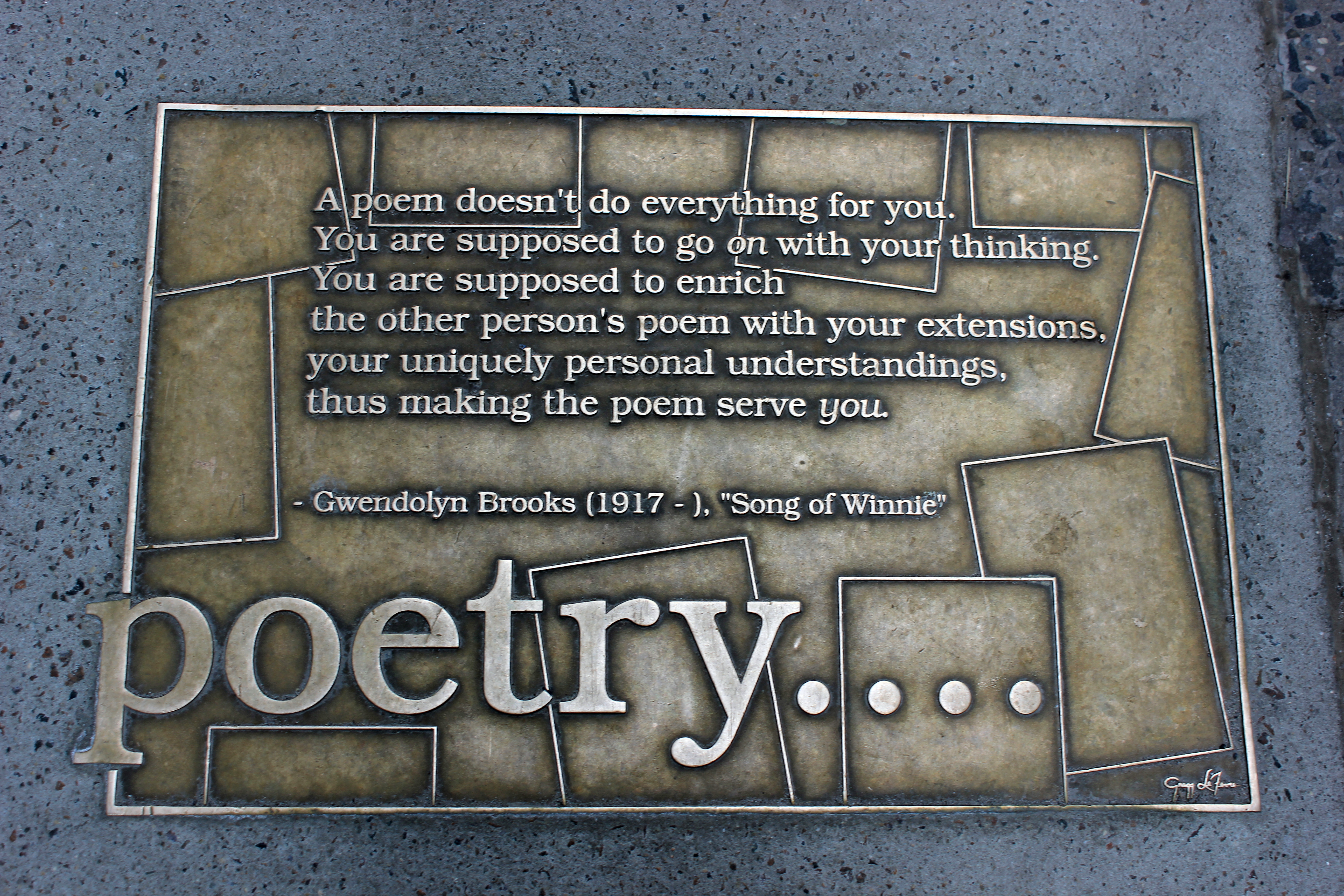 Library Walk New York City